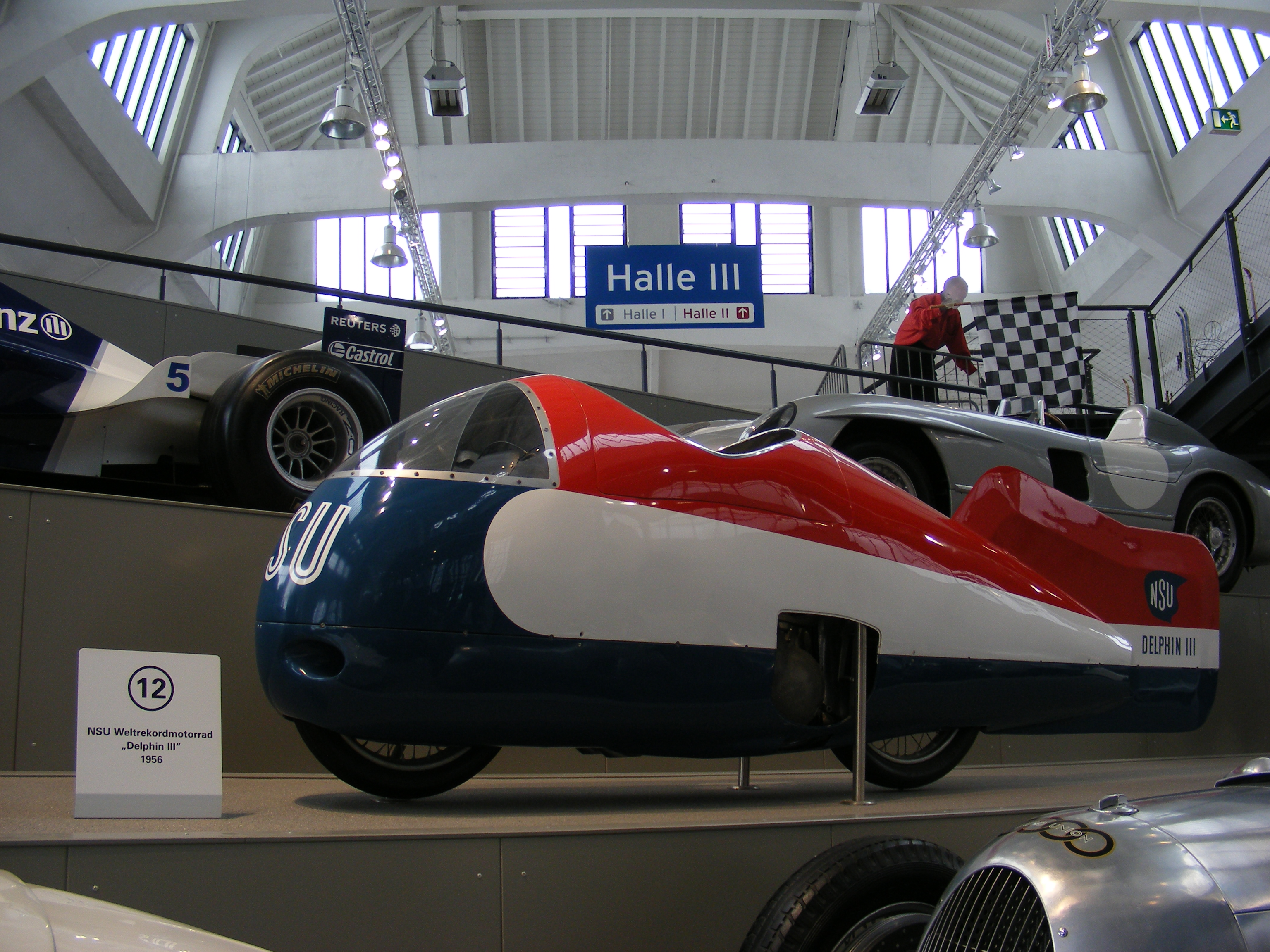 NSU Delphin III — Exponat im Deutschen Museum Verkehrszentrum München